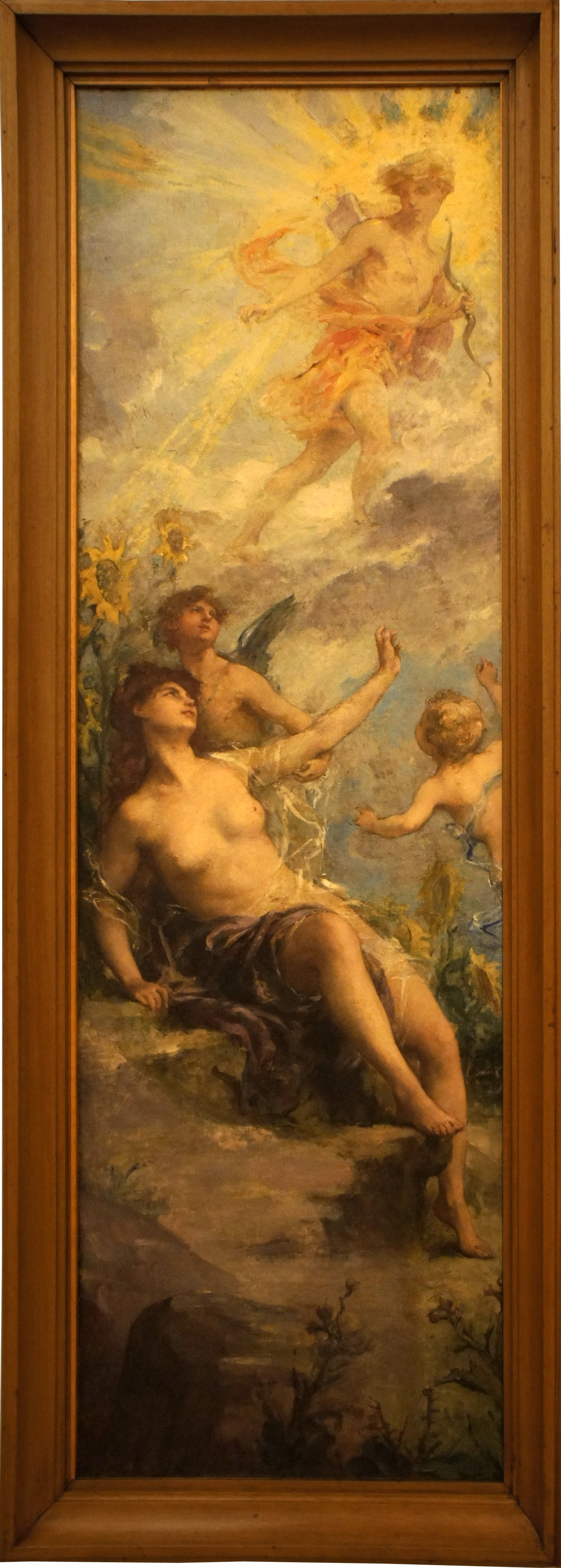 Clitia_changée_en_tournesol par _H-L_Lévy .